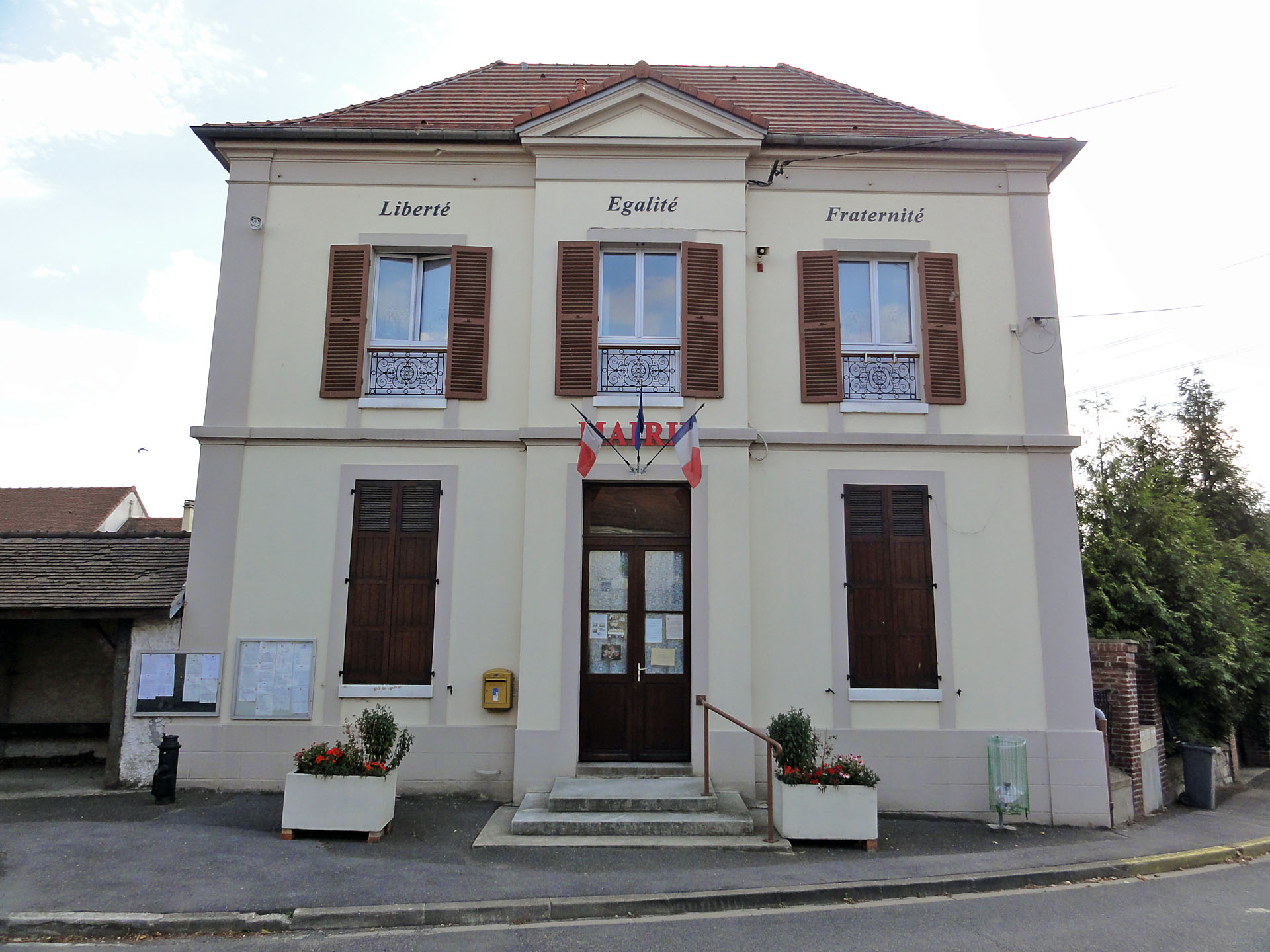 La mairie de Bouqueval, Val-d'Oise, France.